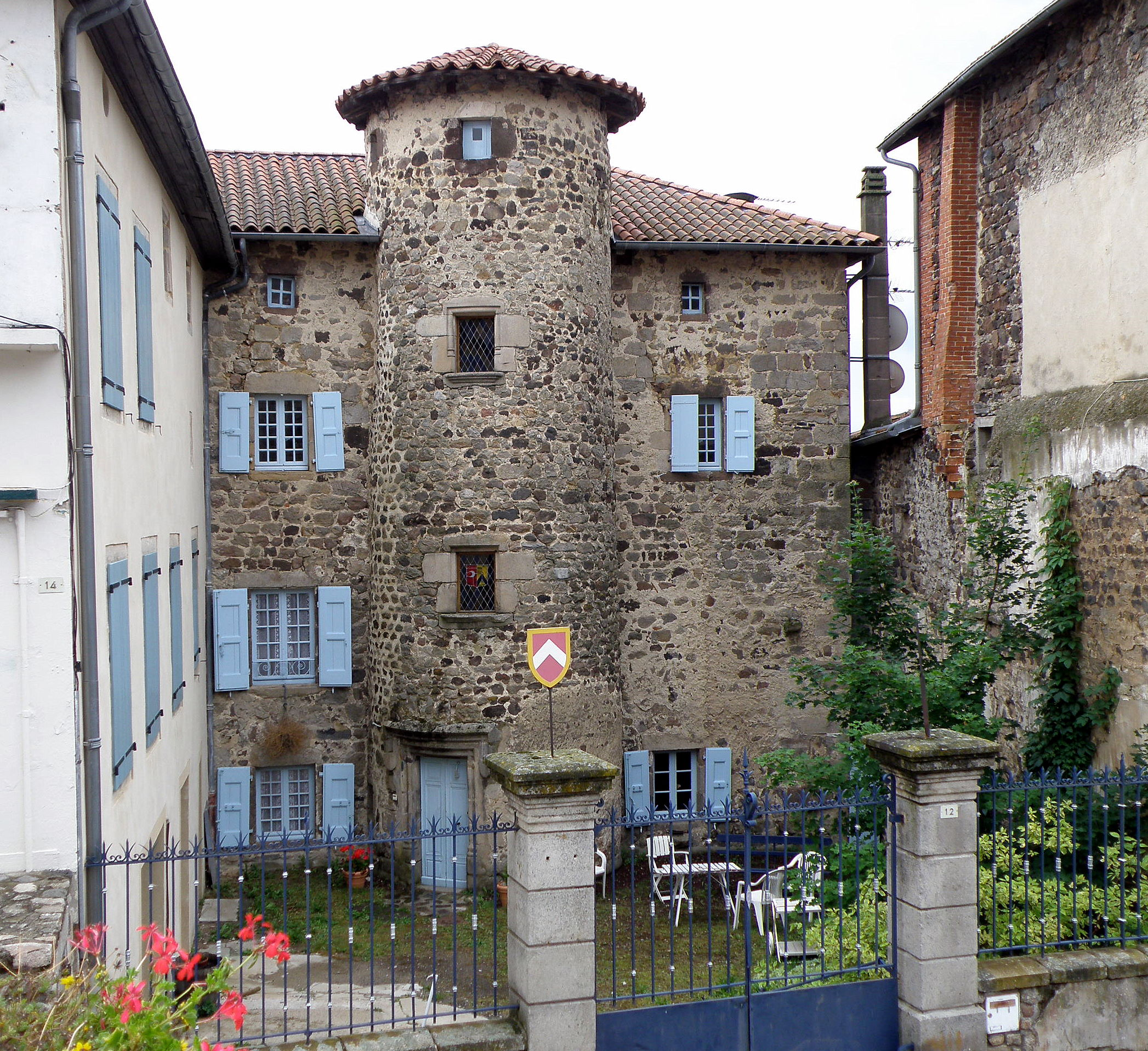 Allègre, dép. de Haute-Loire, France (Auvergne). Hôtel de Bar.